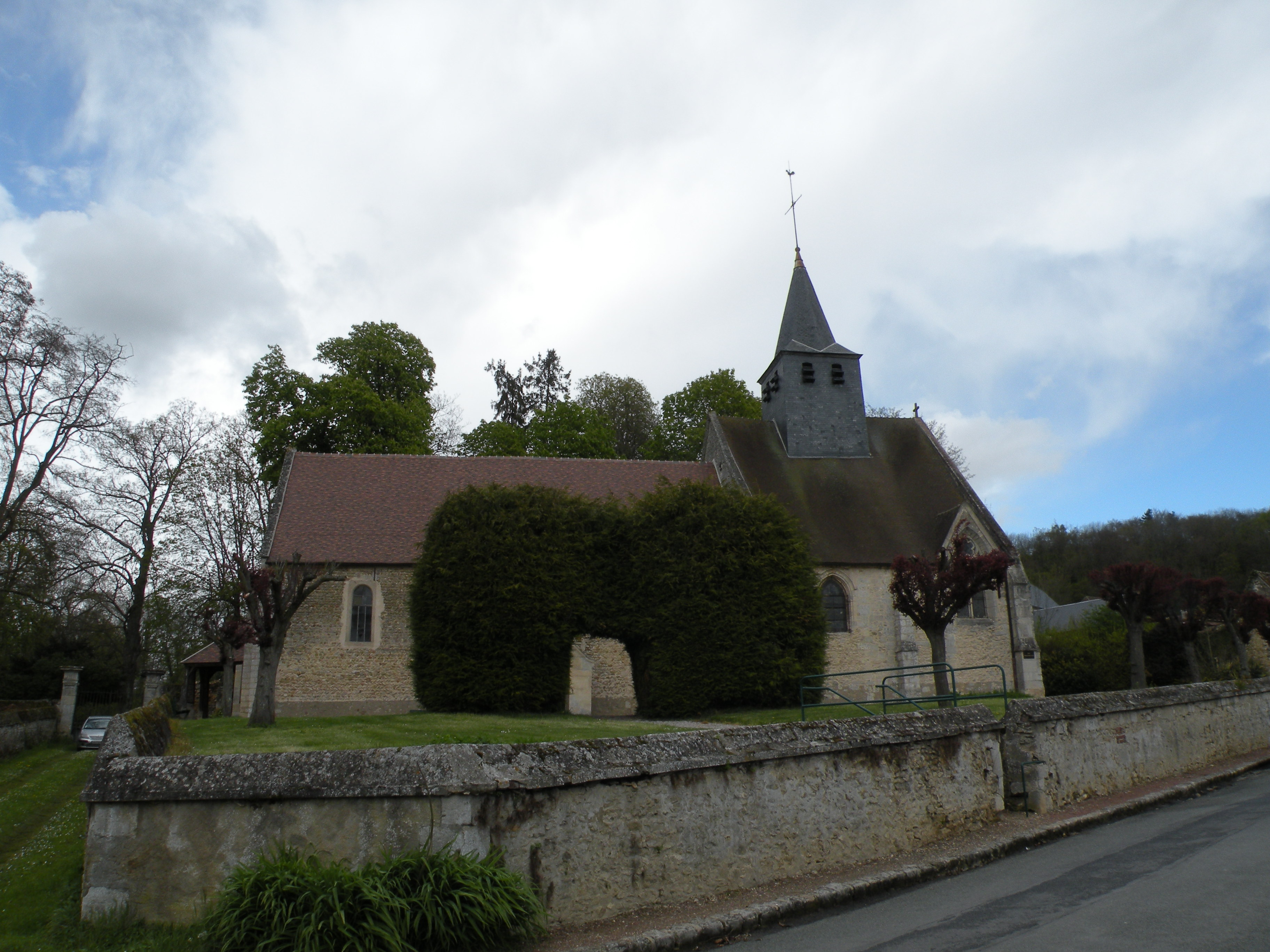 église de Ponchon